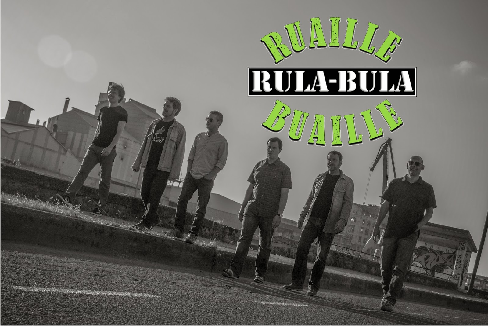 Ruaille-Buaille taldea eta logoa